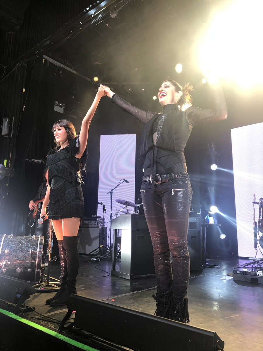 Ha*Ash Irving Plaza NY